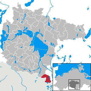 Schwarz im Landkreis Müritz, Mecklenburg-Vorpommern